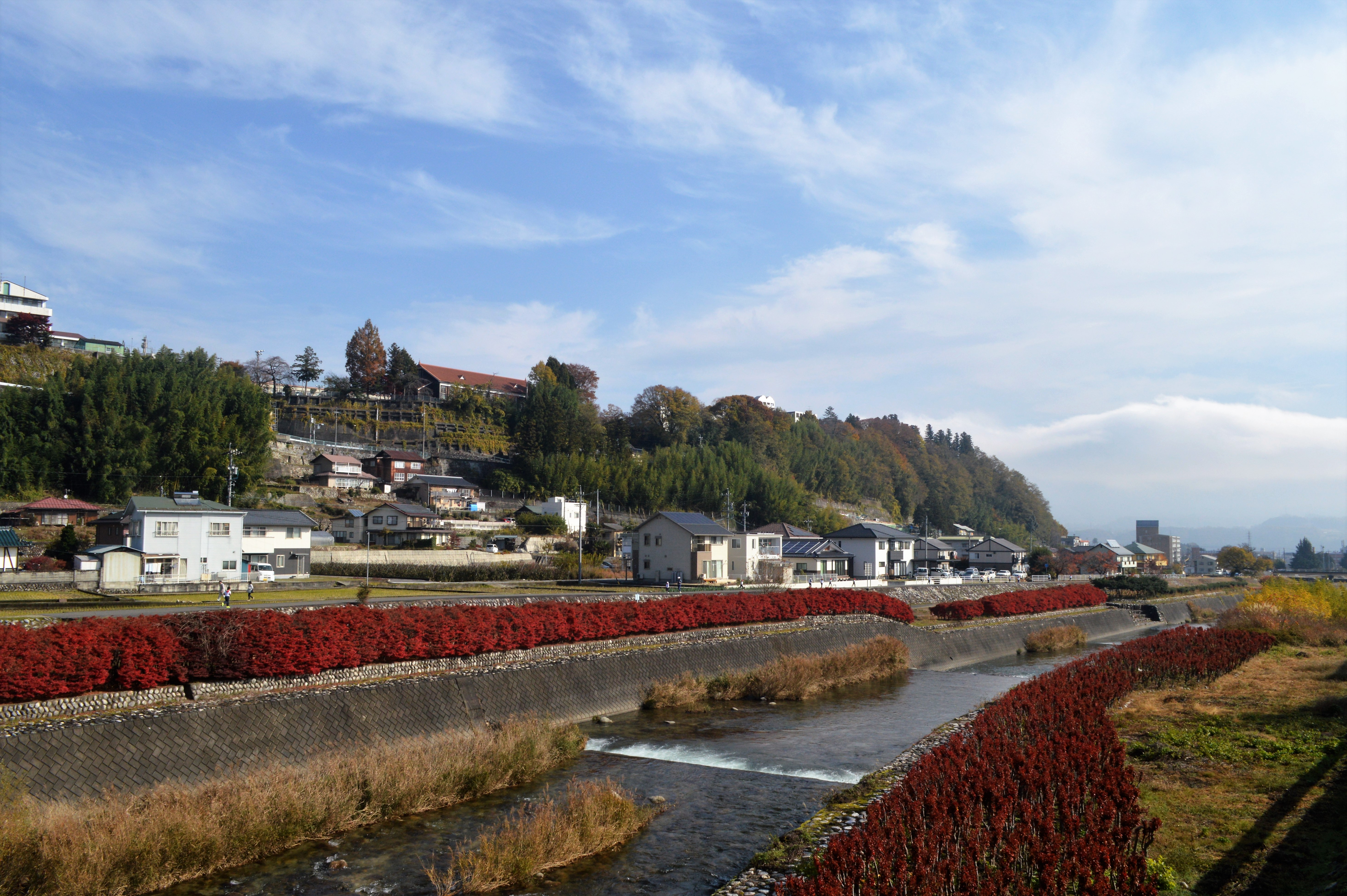 長野県飯田市を流れる松川。鼎橋南側から北東を向いて撮影。中央の高台は飯田城二の丸。赤屋根は飯田市立追手町小学校。